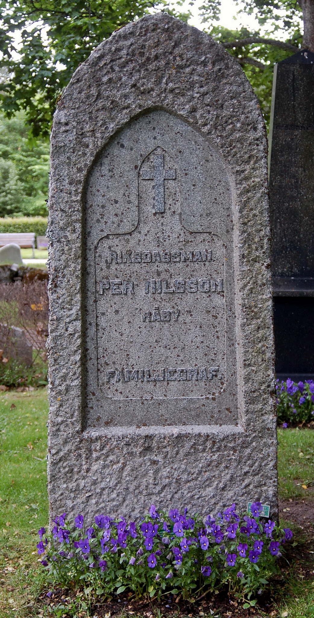 Riksdagsman Per Nilssons gravvård vid Mosjö kyrka.